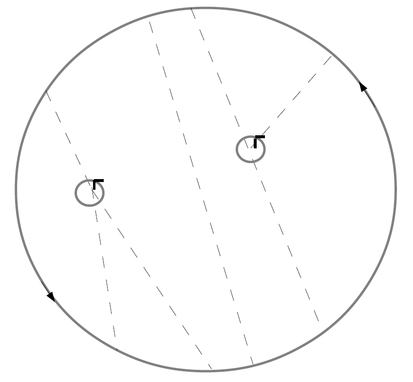 An example of Jacobi Diagram